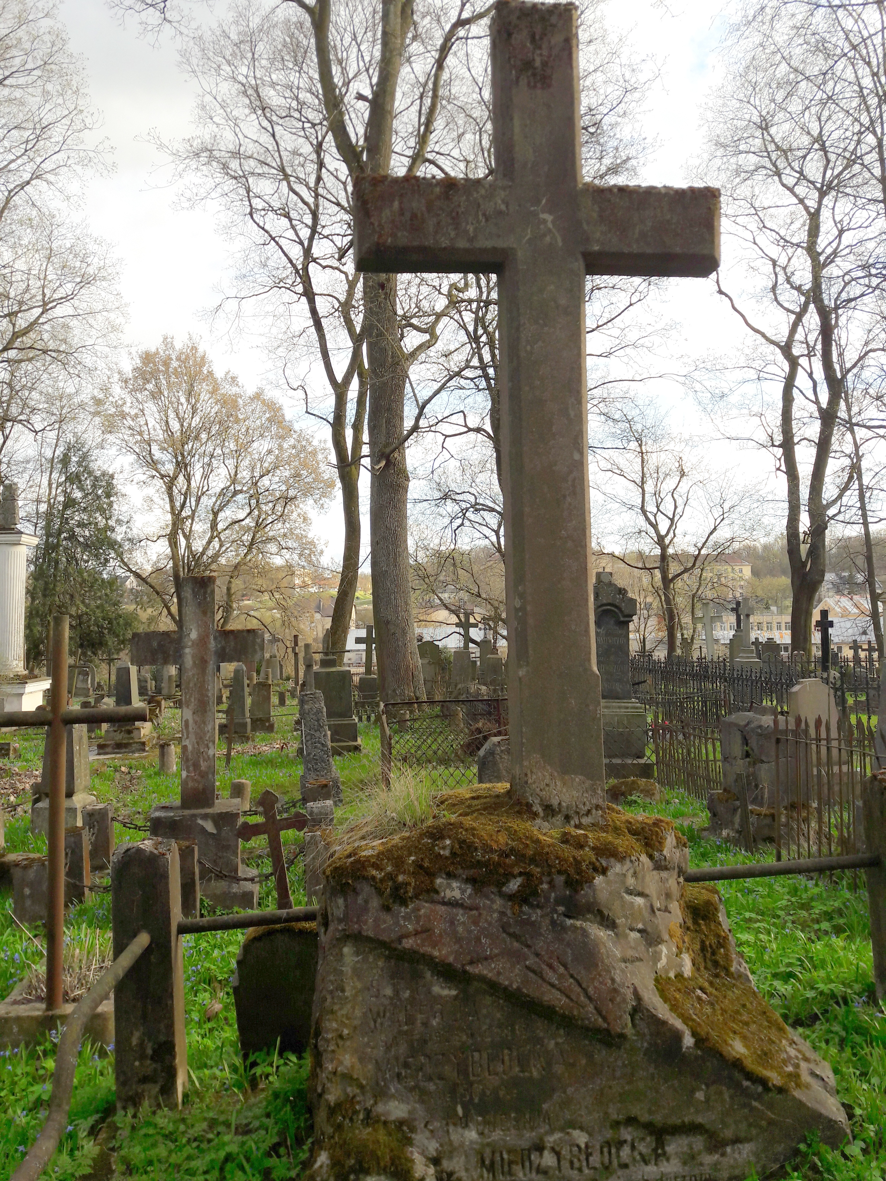 Valerijos Bartuševičiūtės Medziblockos antkapis Bernardinų kapinėse